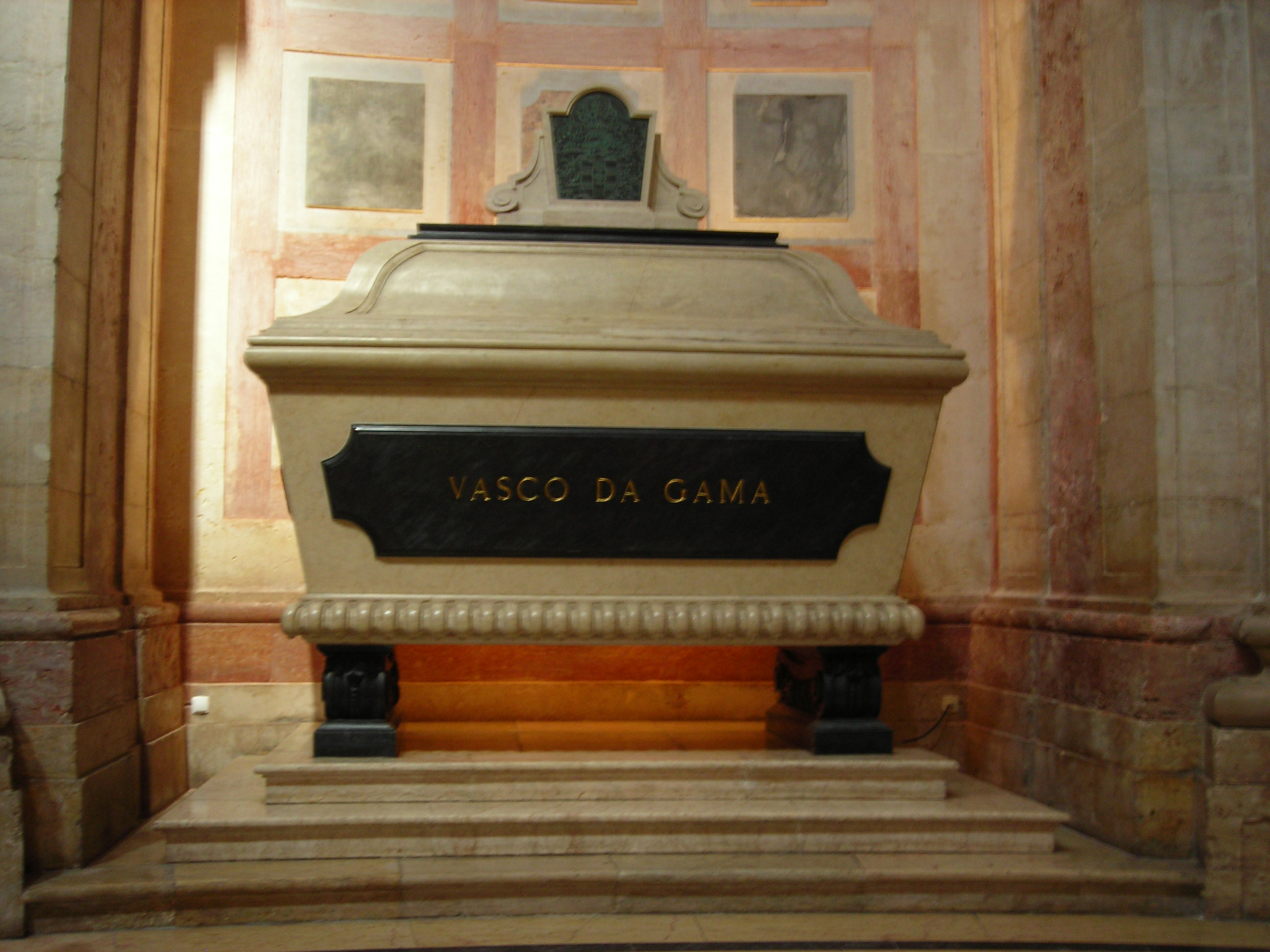 Panteão Nacional - Cenotáfio de Vasco da Gama